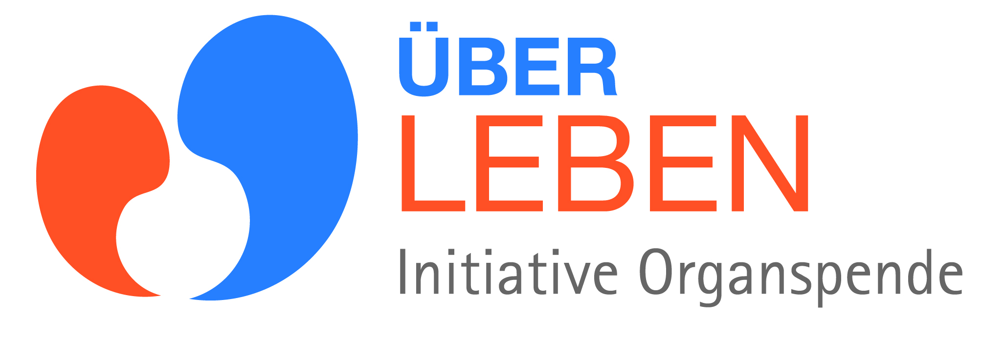 Logo Stiftung ÜBERLEBEN